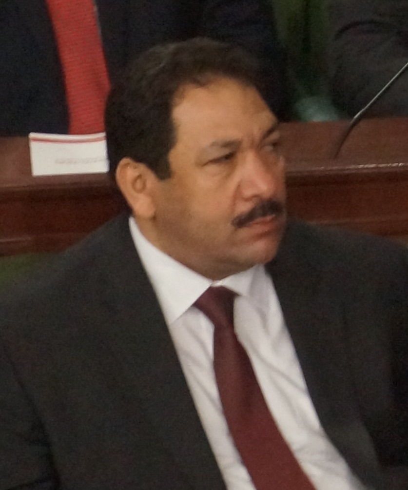 Lotfi Ben Jeddou, ministre tunisien de l'Intérieur, à l'assemblée constituante